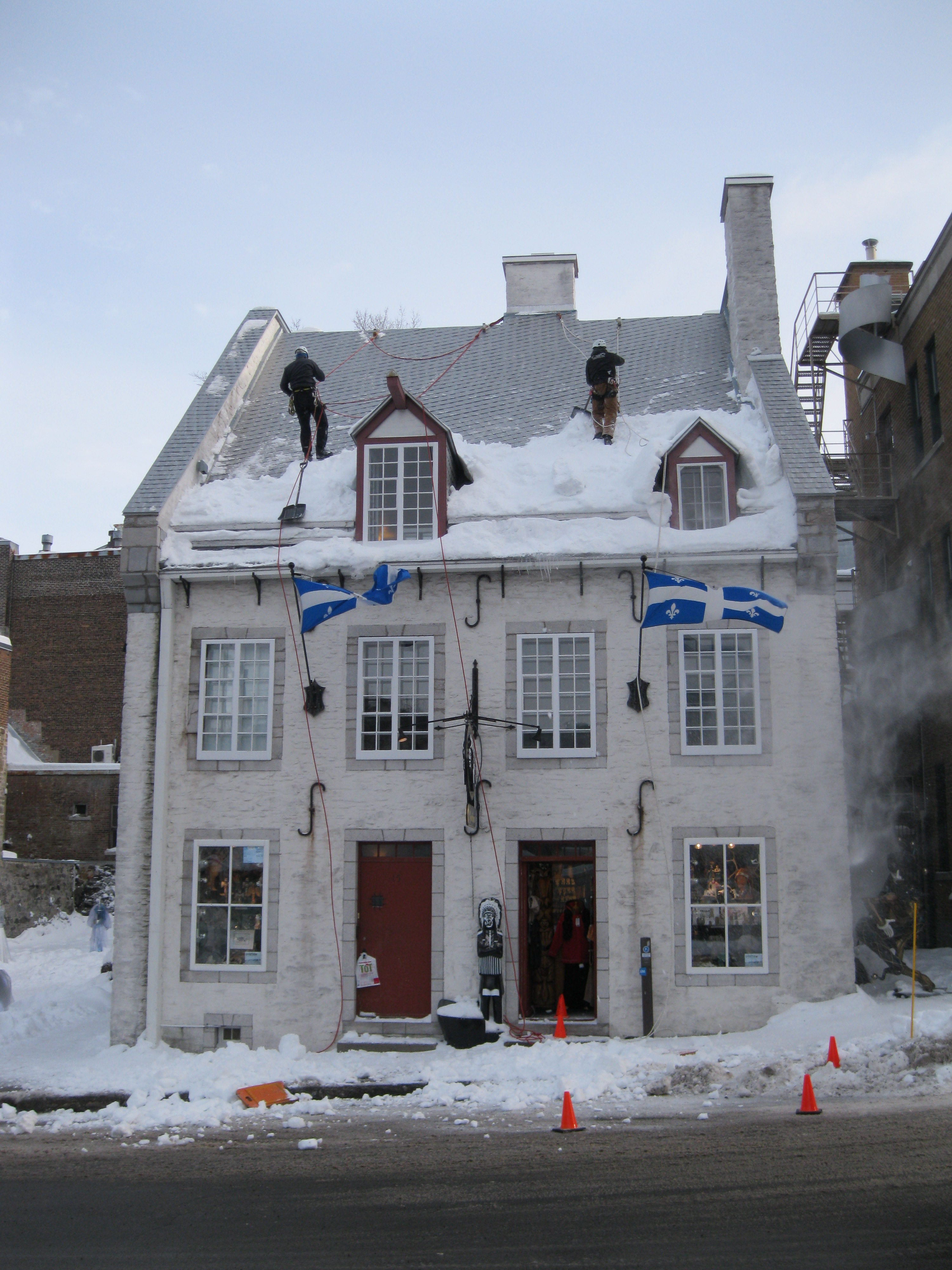 Déneigement du toit de la maison Antoine-Vanfelson, 11, rue des Jardins, Vieux-Québec - Vidéo